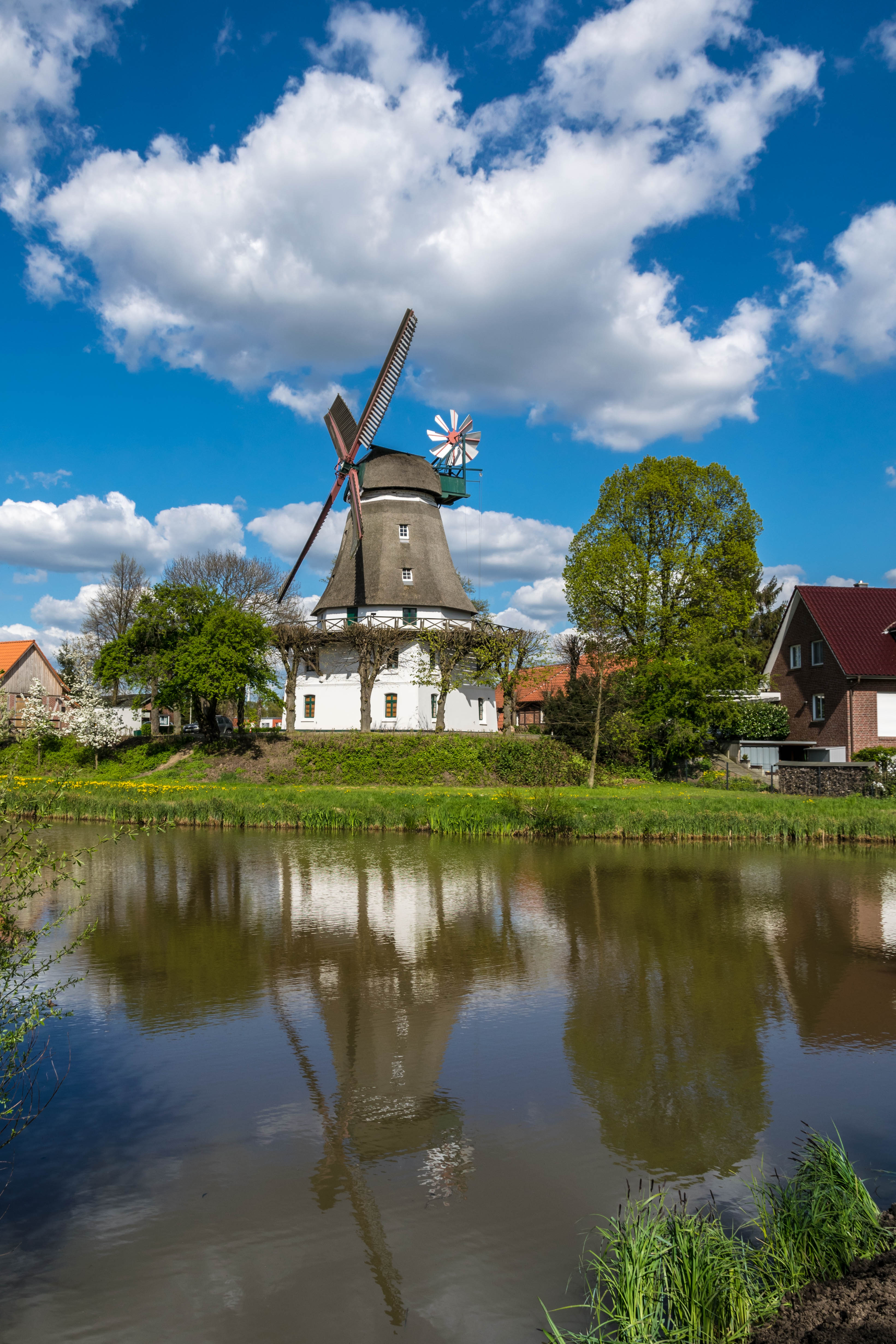 Windmühle "Johanna" Denkmal des bäuerlichen Wilhelmsburg in Hamburg